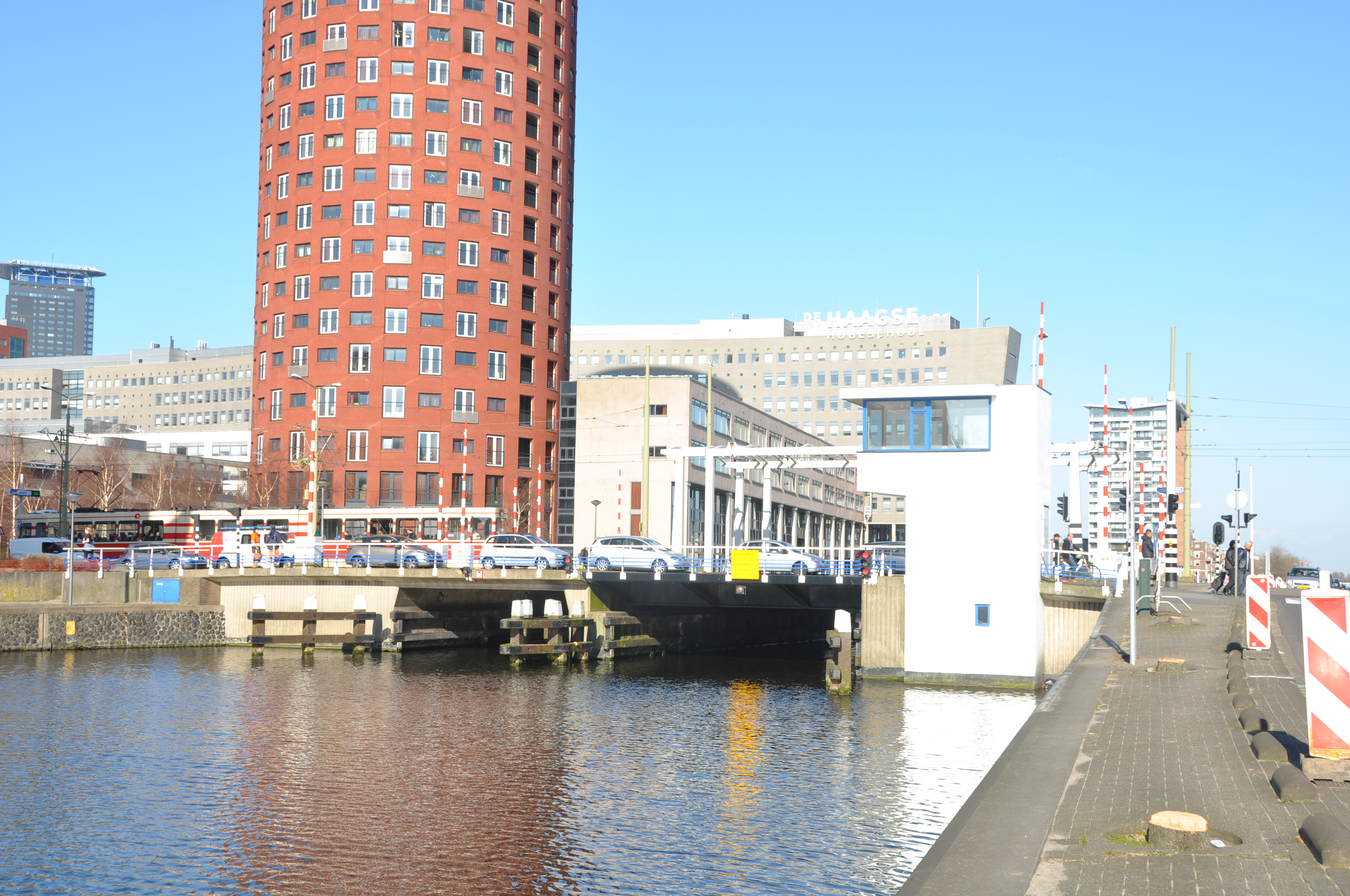 De Leeghwaterbrug in Den Haag.